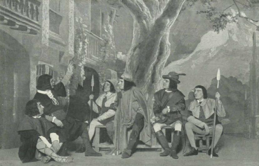 Escena de la obra de teatro Los intereses creados, en representación de 1911 en el Teatro Español.